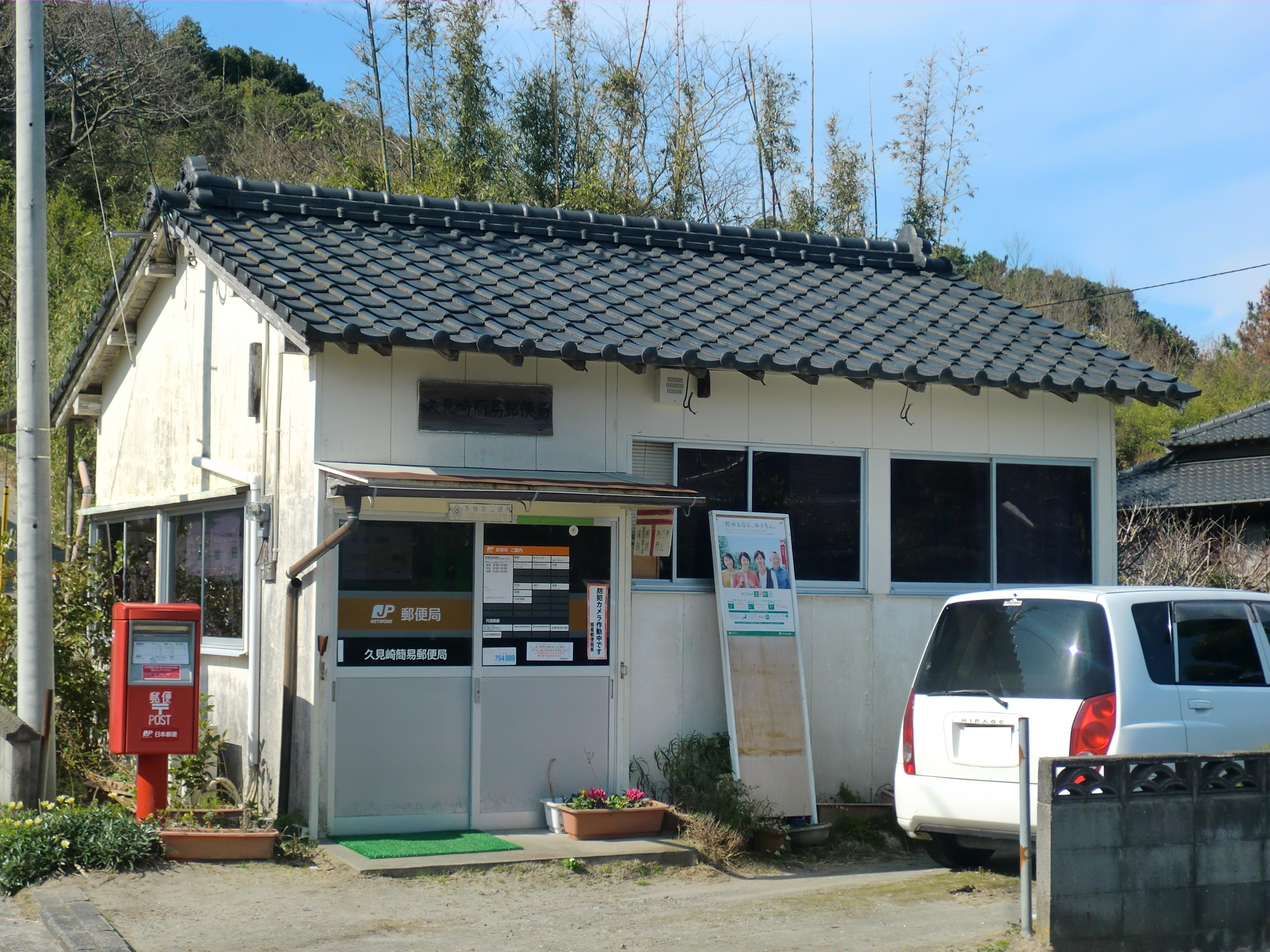 薩摩川内市にある久見崎（くみざき）簡易郵便局